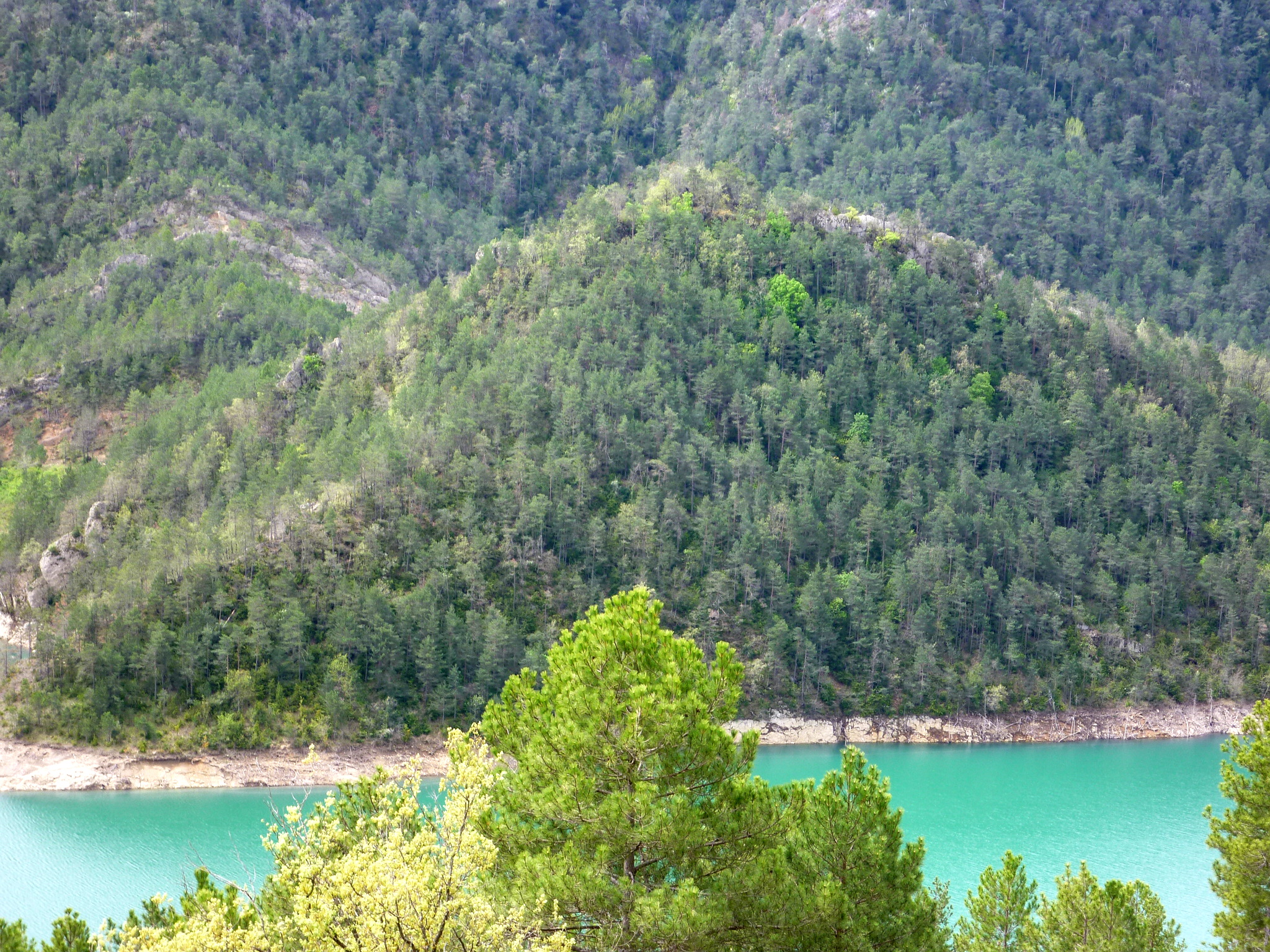 Església de Sant Climent de Castelltort (Guixers): turó a l'altra banda de l'embassament de la Llosa del Cavall on es troba l'església vella